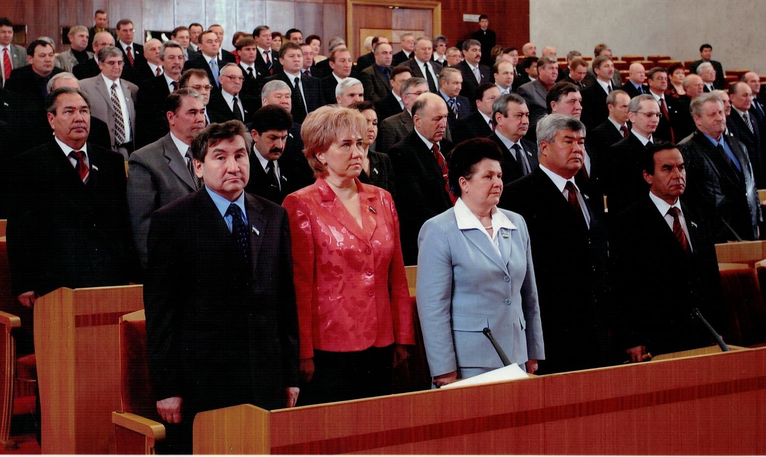 Депутаты Государственного Собрания Республики Башкортостан. 2-й созыв.